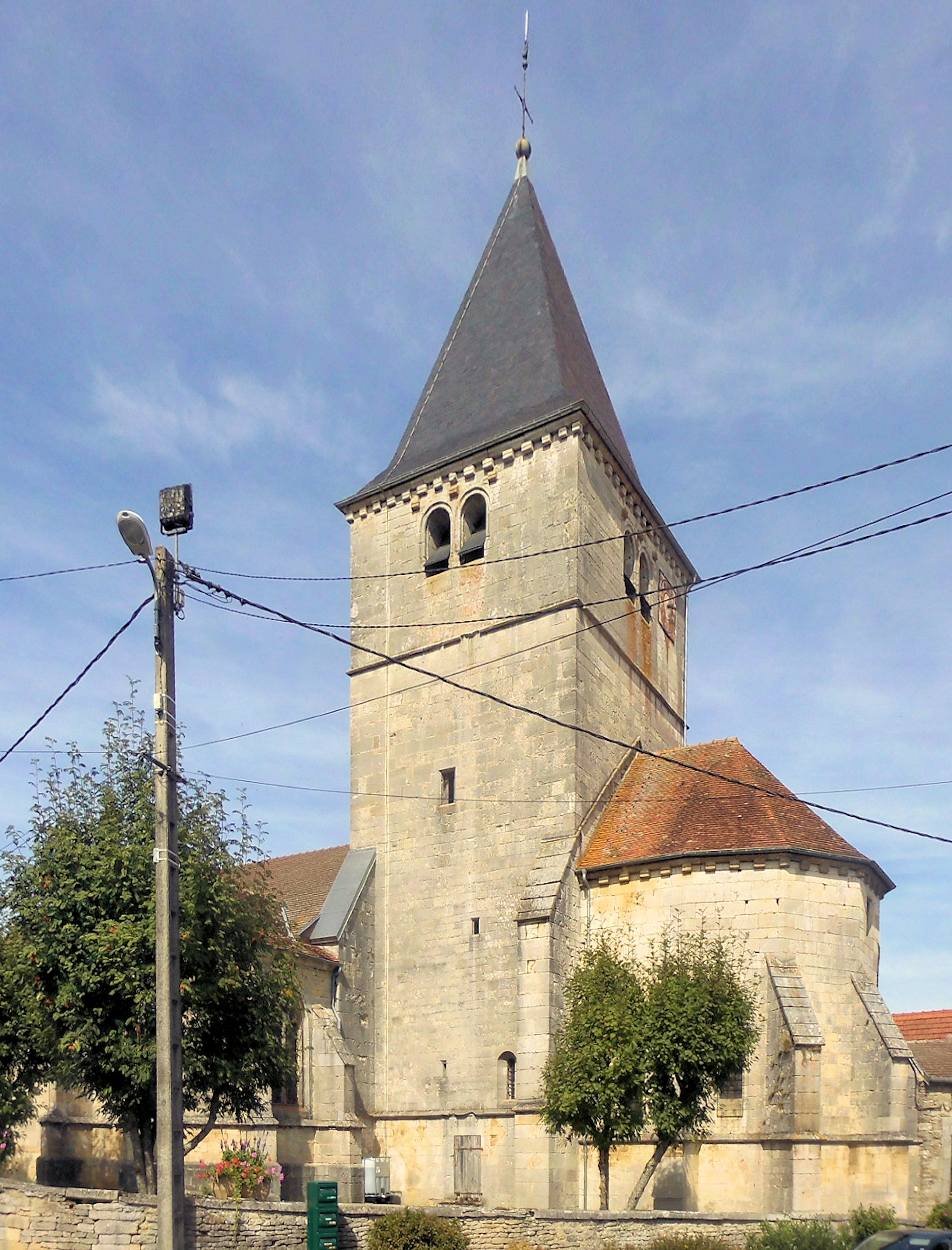 L'église Saint-Martin à Huilliécourt, côté sud-est